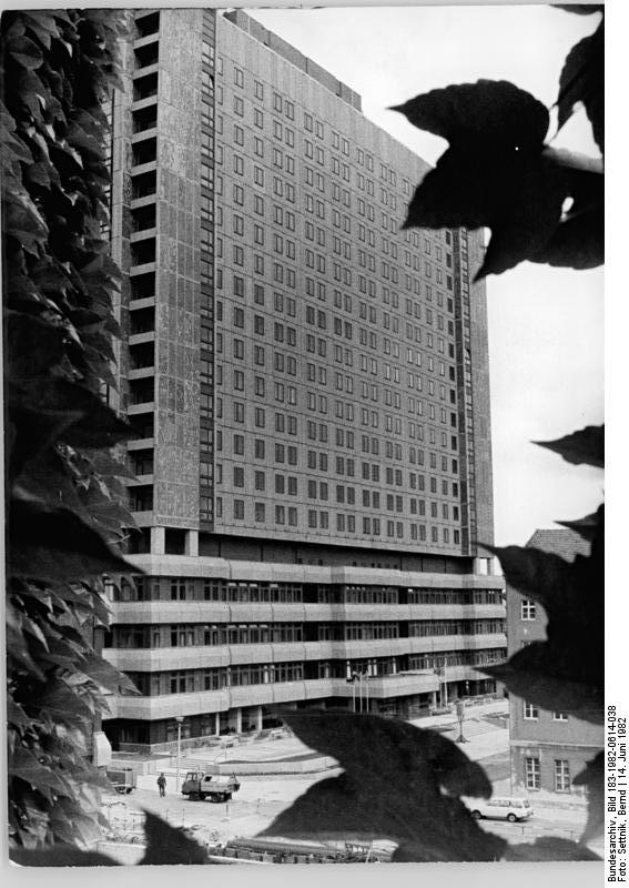 Berlin, Krankenhaus, Charité, Hochhaus ADN-ZB Settnik 14-6-82 Berlin: Neubau Charité - Als ein weiteres Wahrzeichen der Hauptstadt erhebt sich das 86 Meter hohe Gebäude auf dem Gelände der Charité. In den 23 Etagen des Bauwerks sind u. a. 24 Operationssäle, zahlreiche Diagnoseräume, Spezialabteilungen wie Intensivmedizin und Herzzentrum mit über 1000 Betten untergebracht.